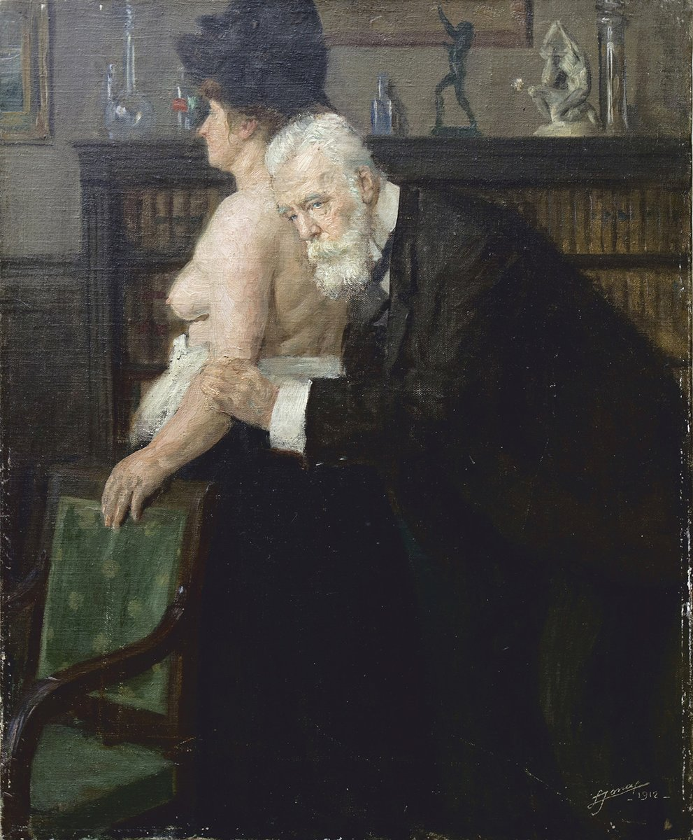 картины художника Люсьен Гектор Йонас (1880 — 1947)